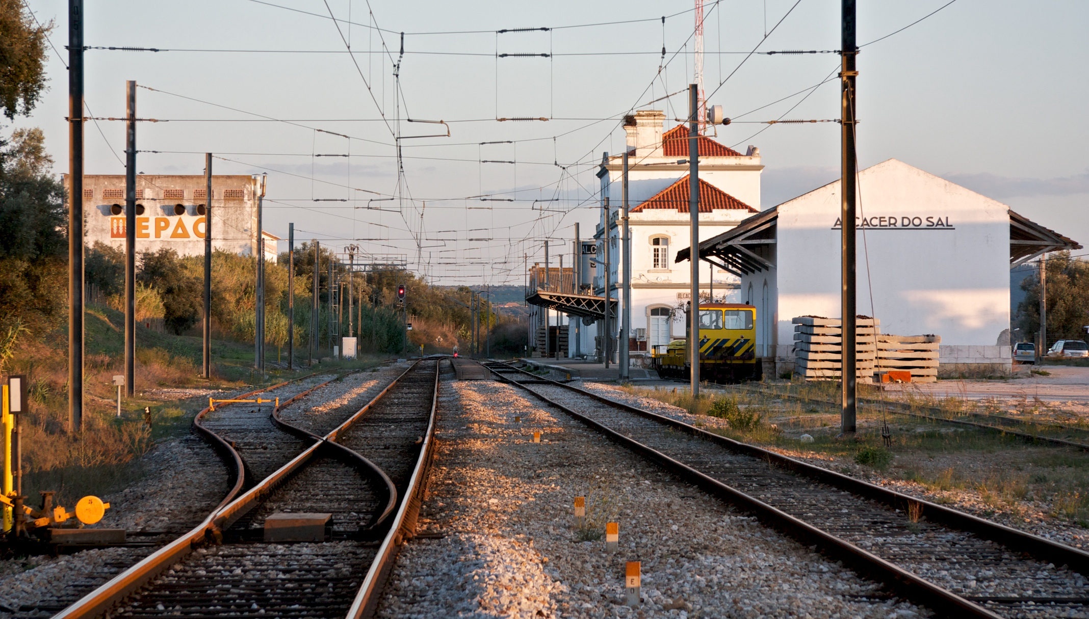 Tipo: EC Estação de Concentração Local: Alcácer do Sal [Linha do Sul, PK 78] Data e hora: 6 de Novembro de 2011 [17h11]